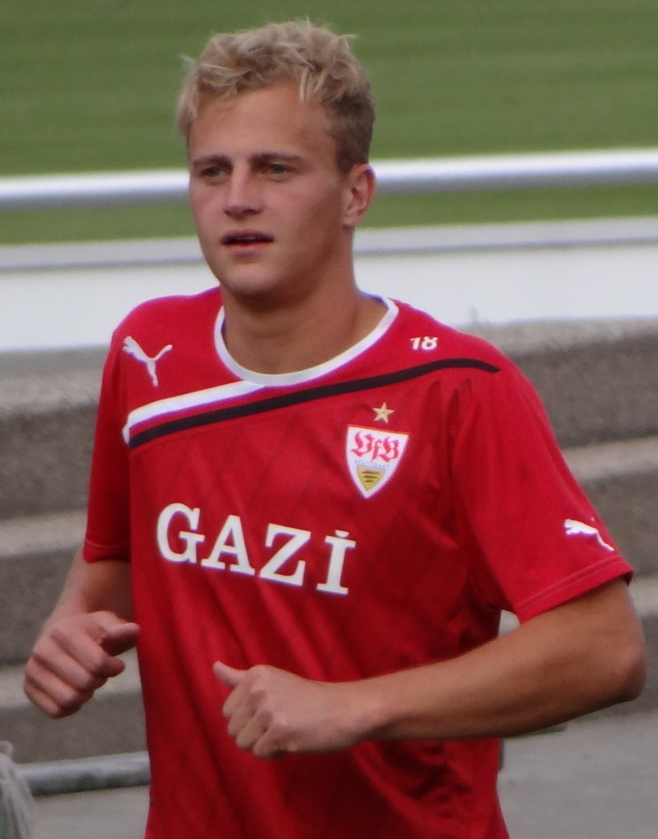 aufgenommen beim VfB-Training von